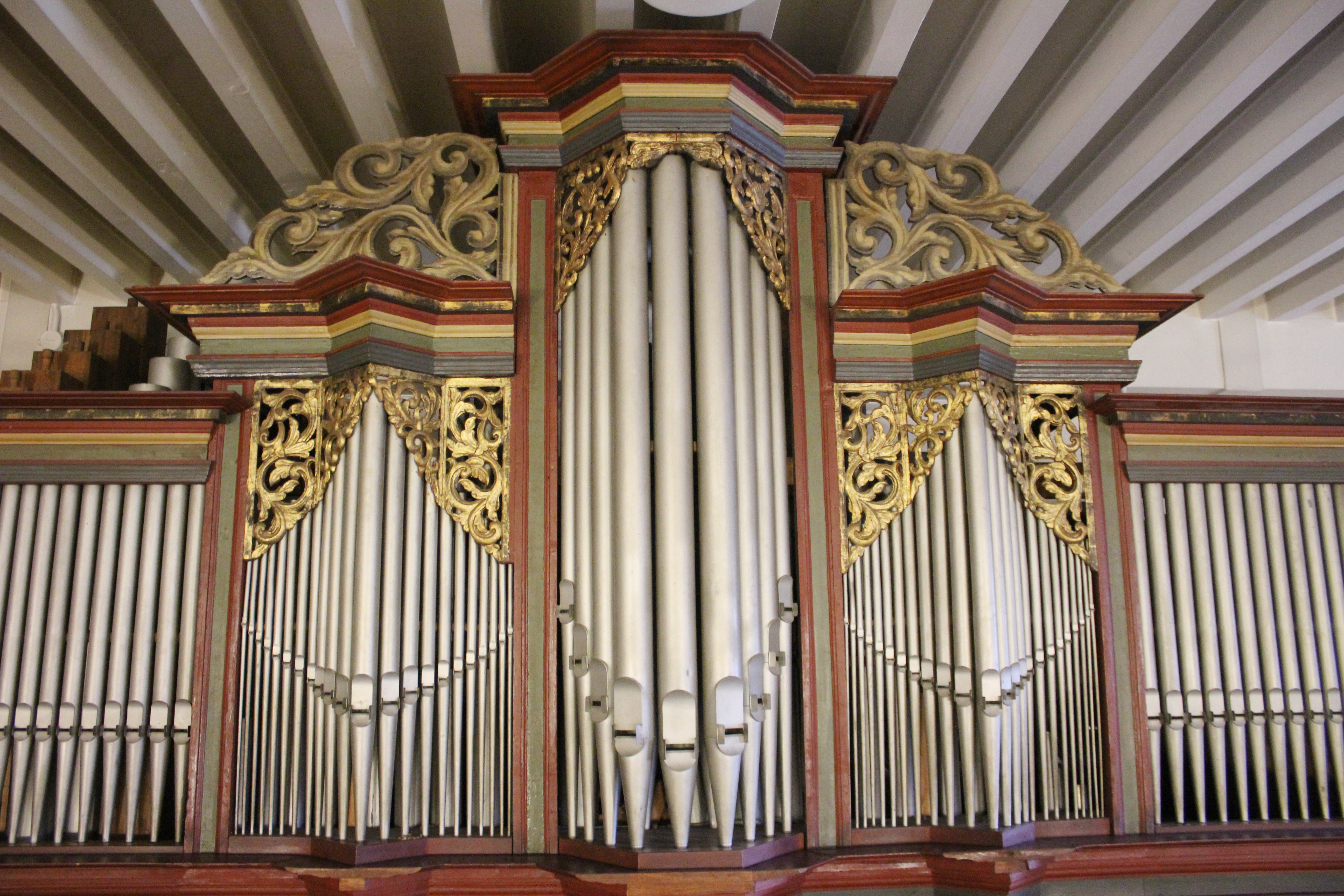 Evangelische Kirche Münchholzhausen, Wetzlar, Lahn-Dill-Kreis, Hessen, Deutschland